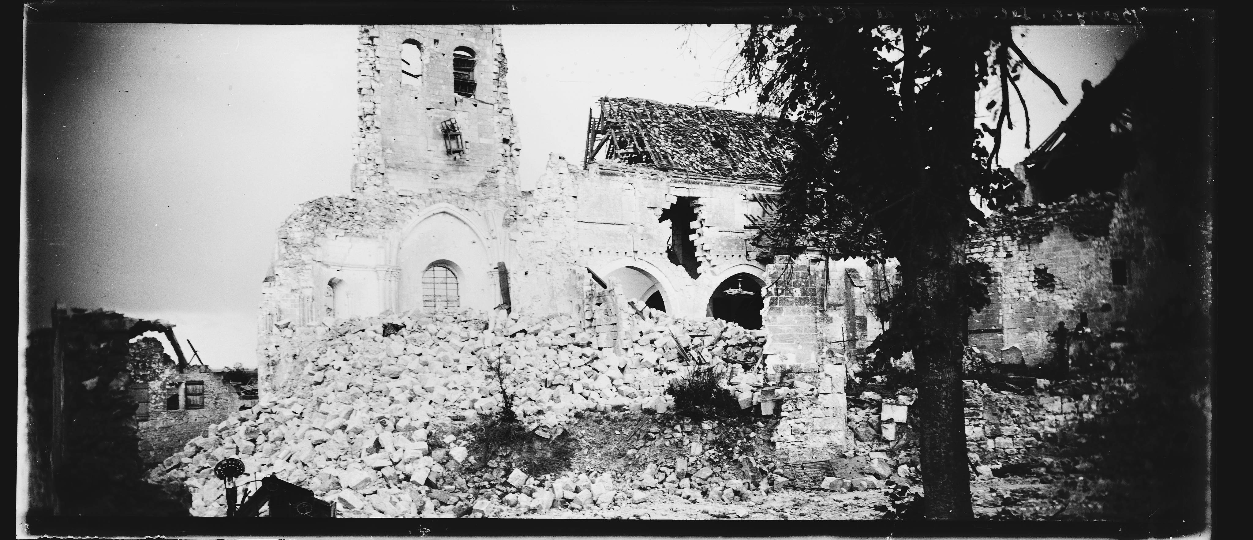 Vue panoramique des ruines de l'église de Berzy-le-Sec (Aisne). 1918 Guerre 1914-1918.